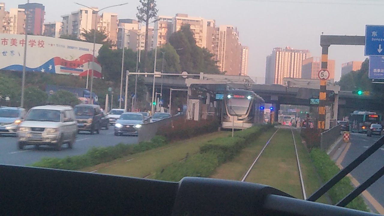 深圳有轨电车东庵站，位于龙华区